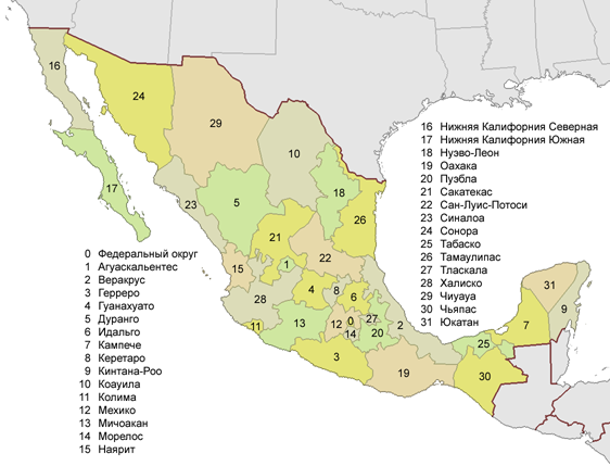 Administrativní rozdělení Mexika v ruském jazyce